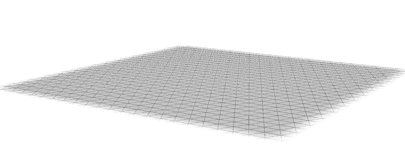 二階三角形鑲嵌堆砌示意圖